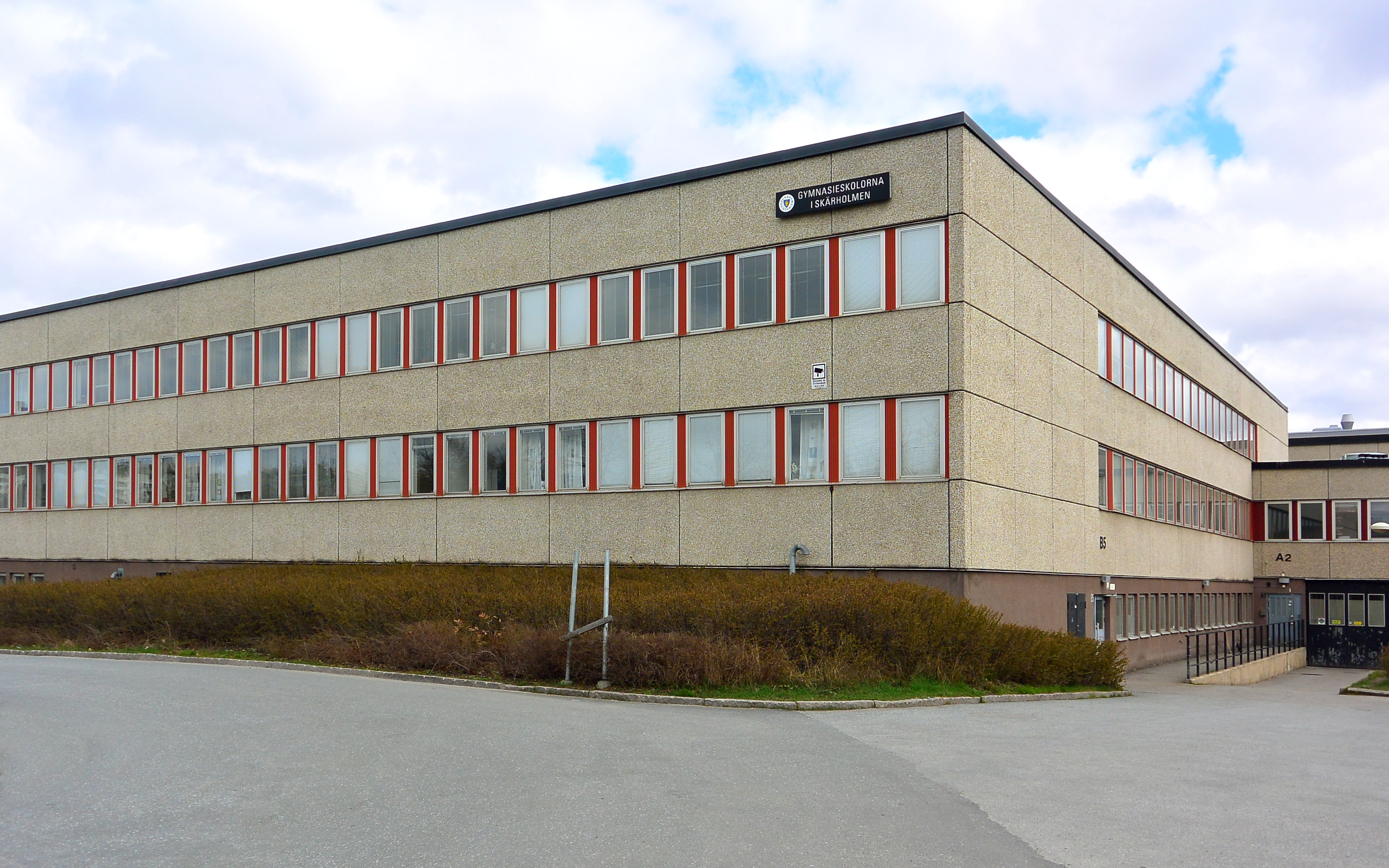 Skärholmens gymnasium i Skärholmen i södra Stockholm.